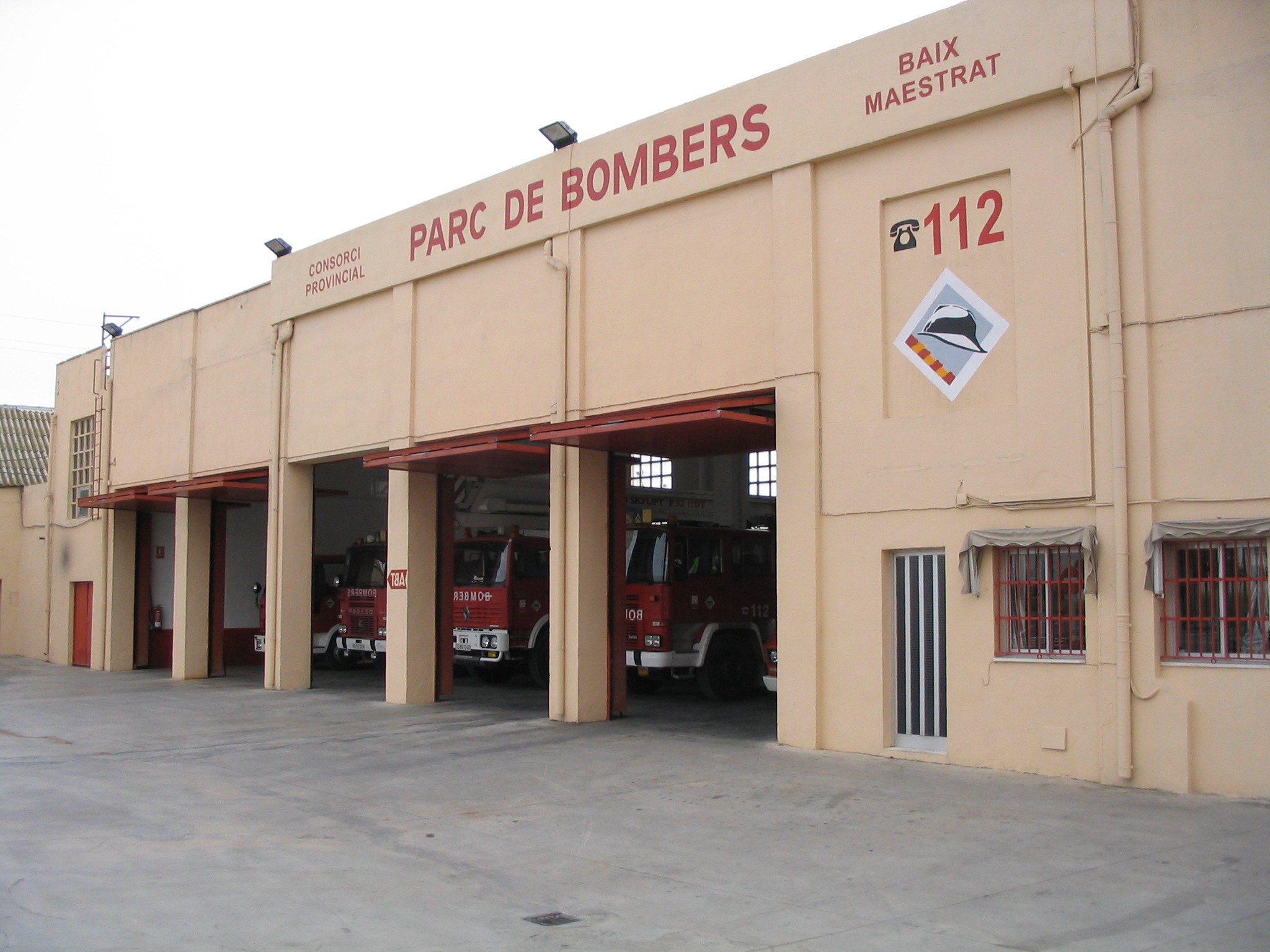 Parque de bomberos en la Comunidad Valenciana